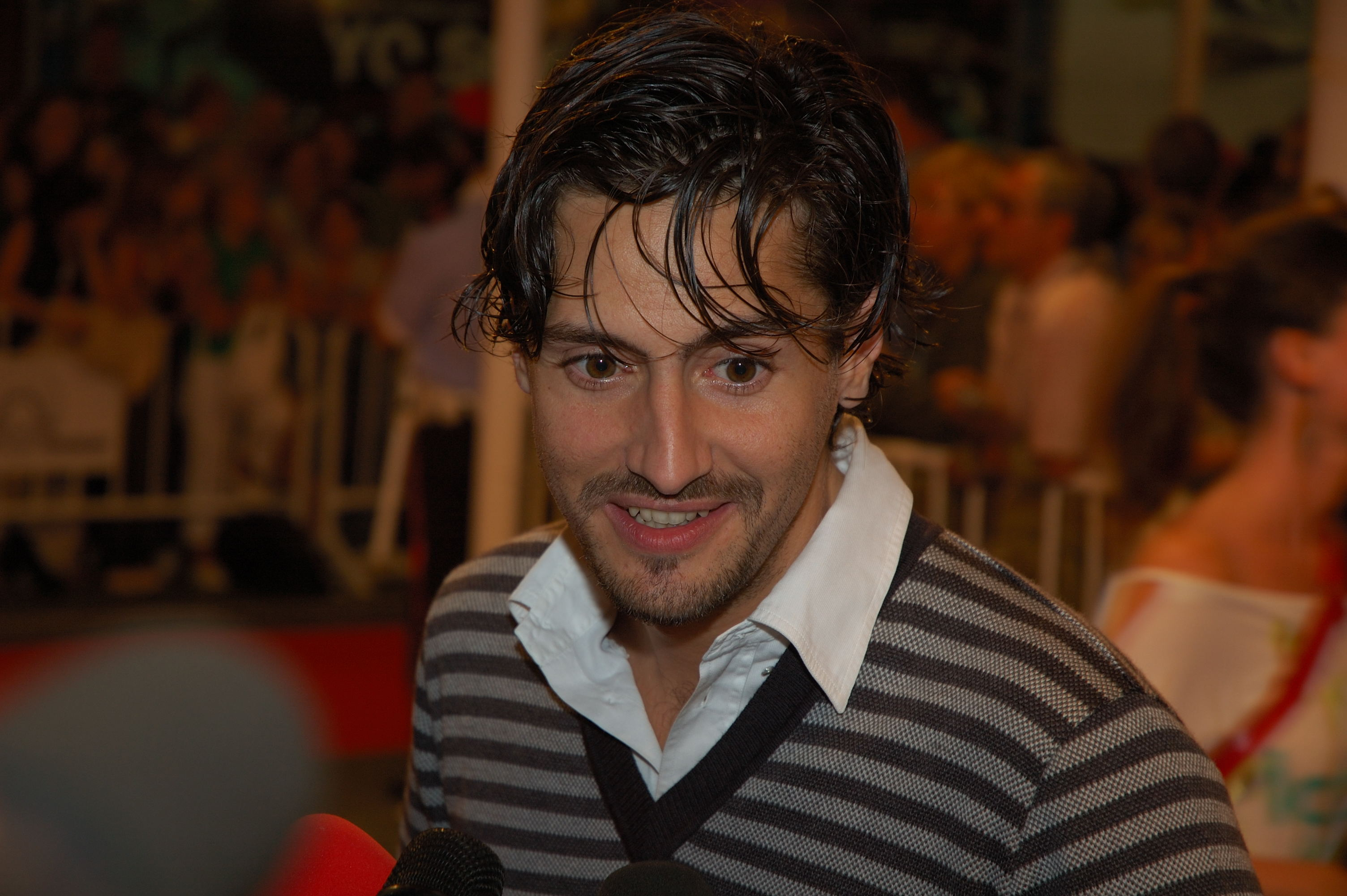 El actor español Juan Diego Botto en el Festival Internacional de Cine de San Sebastián 2006